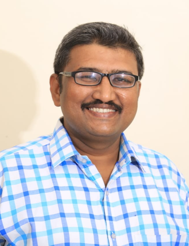 संदीप तापकीर